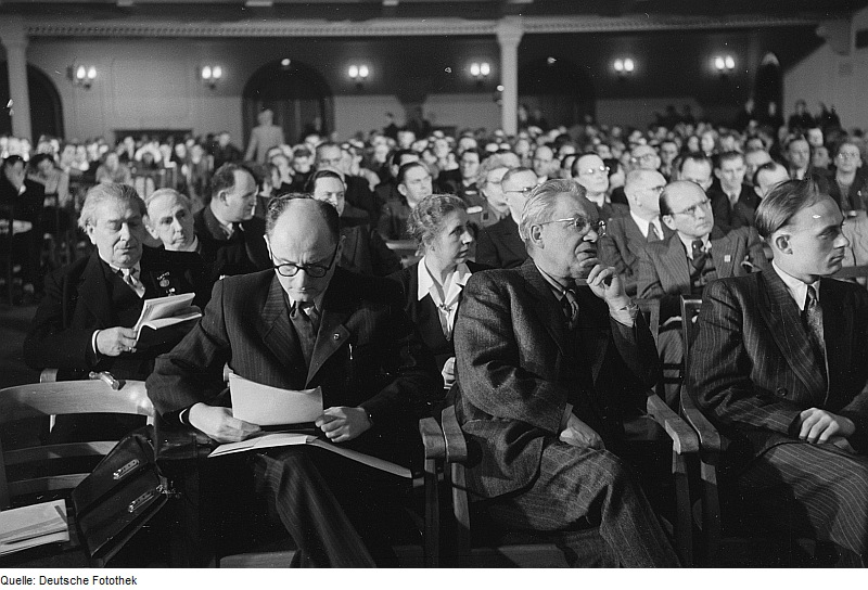 Original image description from the Deutsche Fotothek Blick auf Tagungsteilnehmer; Prof. Dr. Jussuf Ibrahim (2. Reihe, links außen)